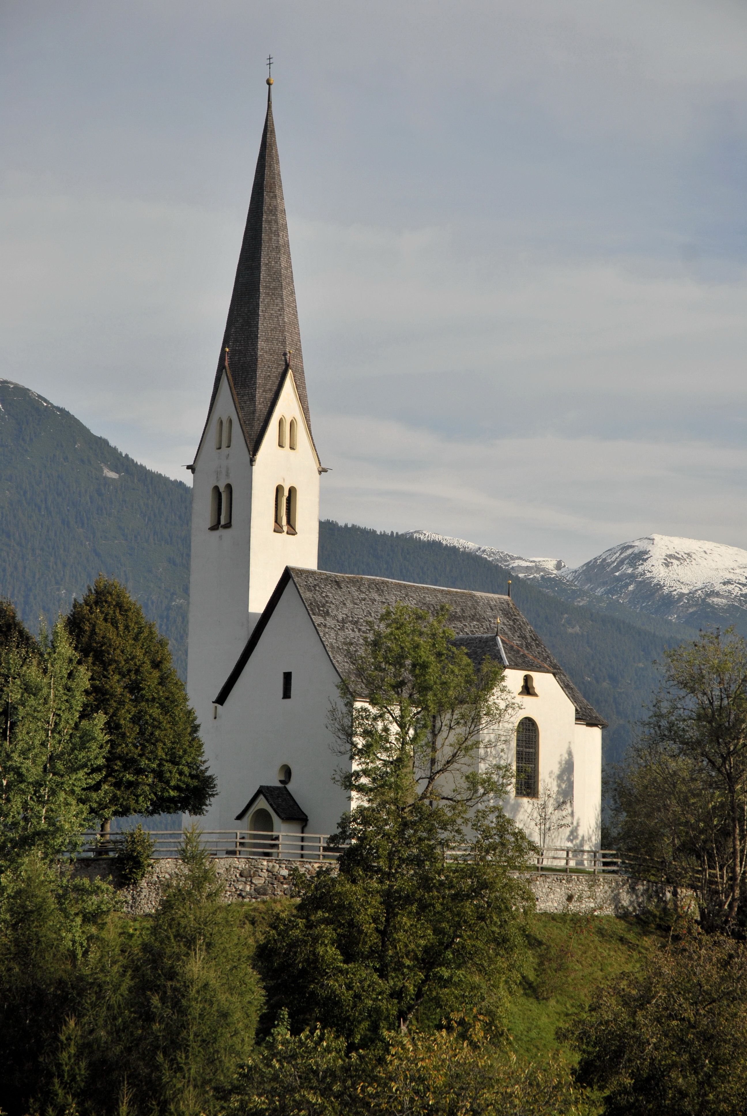 Weerberg, Alte Pfarrkirche Petrus und Paulus